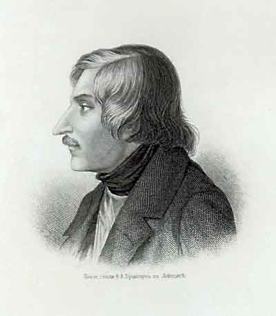 Портрет Н. В. Гоголя работы Э. А. Дмитриева-Мамонова. Гравирован у Ф. А. Брокгауза в Лейпциге. Мастер неизвестен